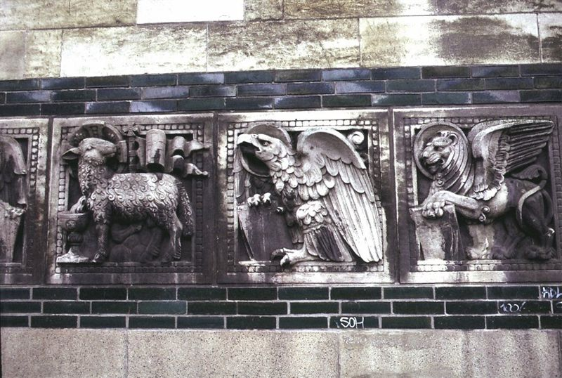 Kristkirken i Danmark. Frise på tårnets sydmur